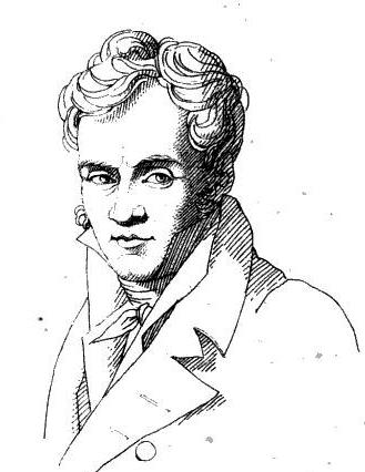 Watelet.